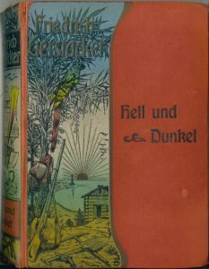 Titelbild Gerstäcker, Hell und Dunkel, um 1900 veröffentlicht Sonstiges: unbekannt